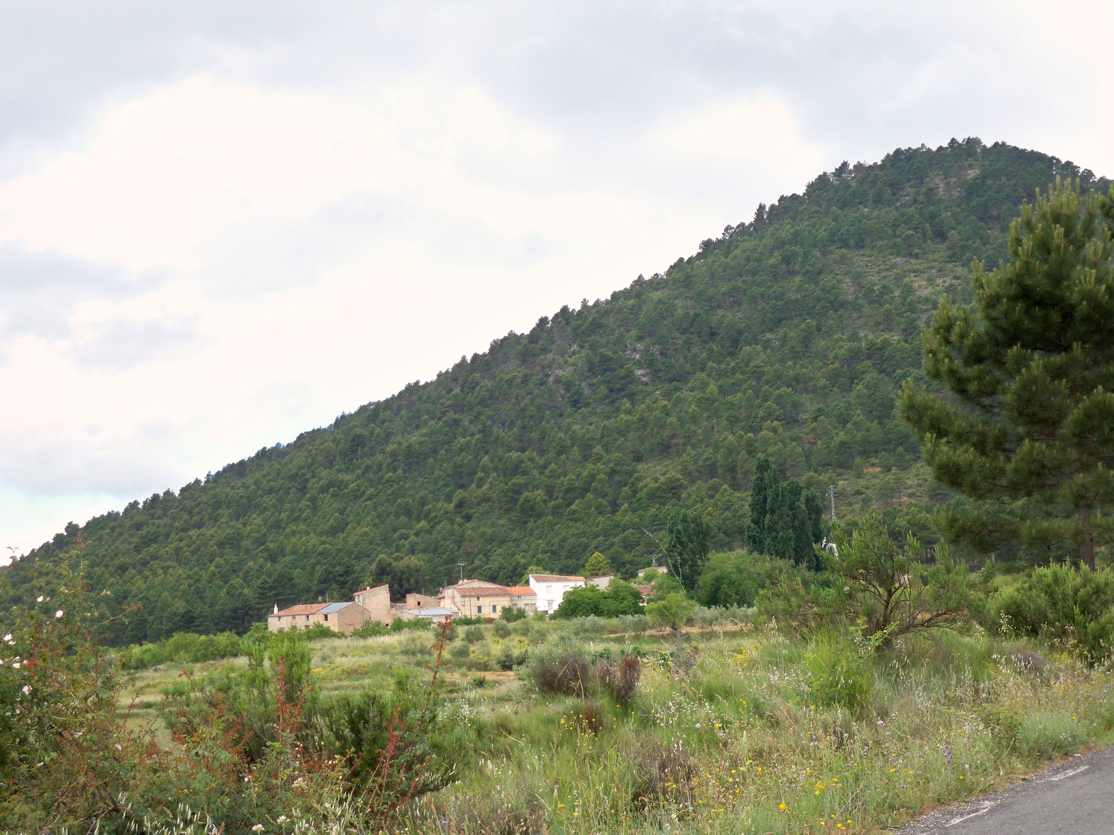 Vista de Las Hoyas, localidad del municipio de Molinicos (Albacete)